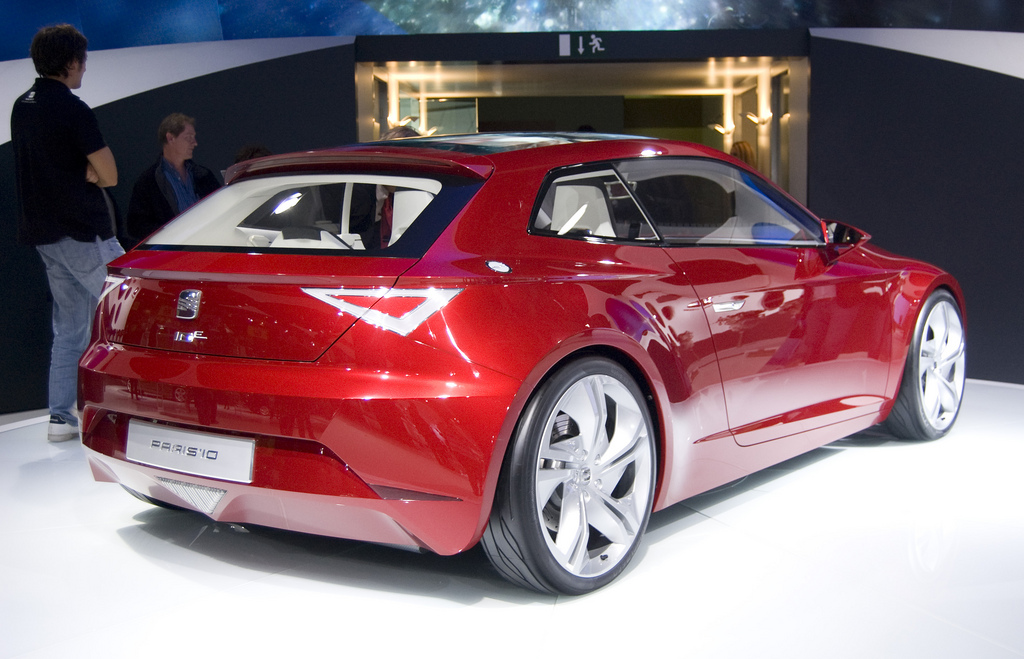 Seat IBE Concept en el Salón de París 2010.